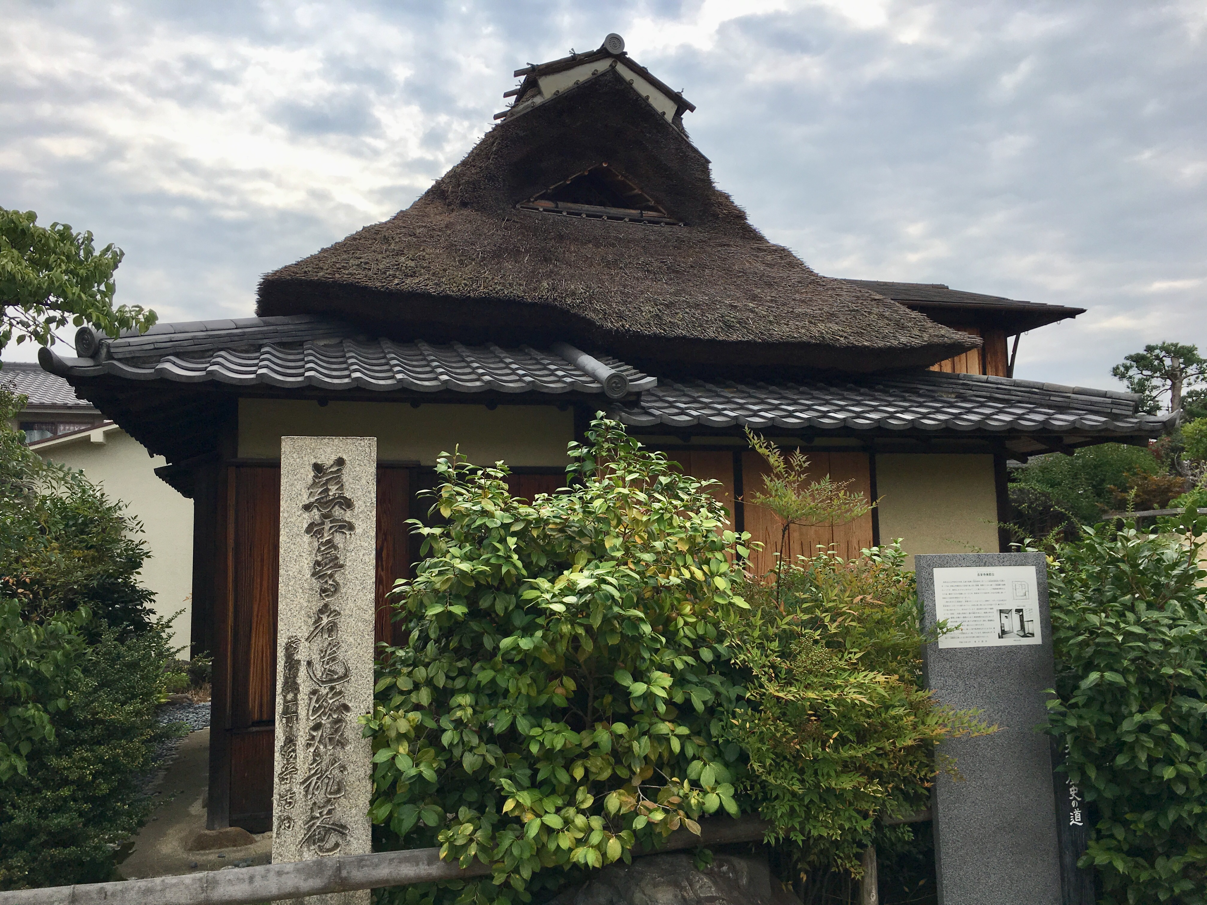 2019年8月、長栄寺で撮影。